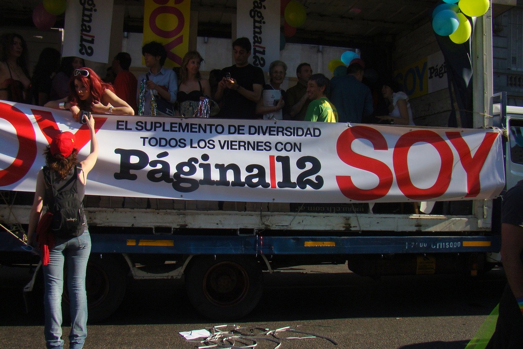 Carroza del suplemento SOY de Pagina/12. Foto tomada el dia sabado 01/11/2008, durante la marcha del orgullo gay en la ciudad de Buenos Aires - Argentina